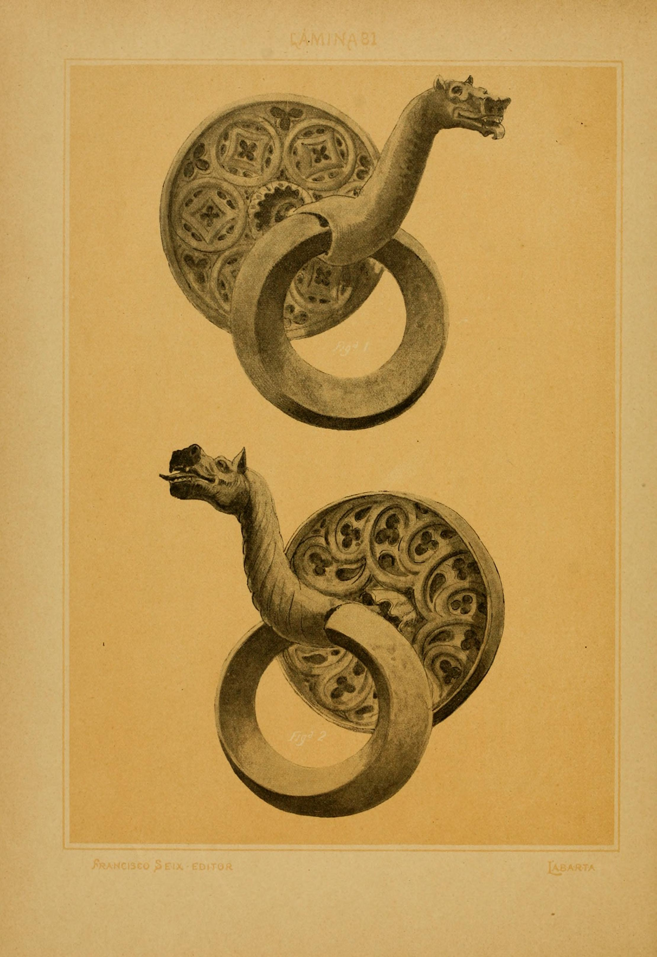 Lámina 91. Arte catalán. Aldabones. Siglo XVI.